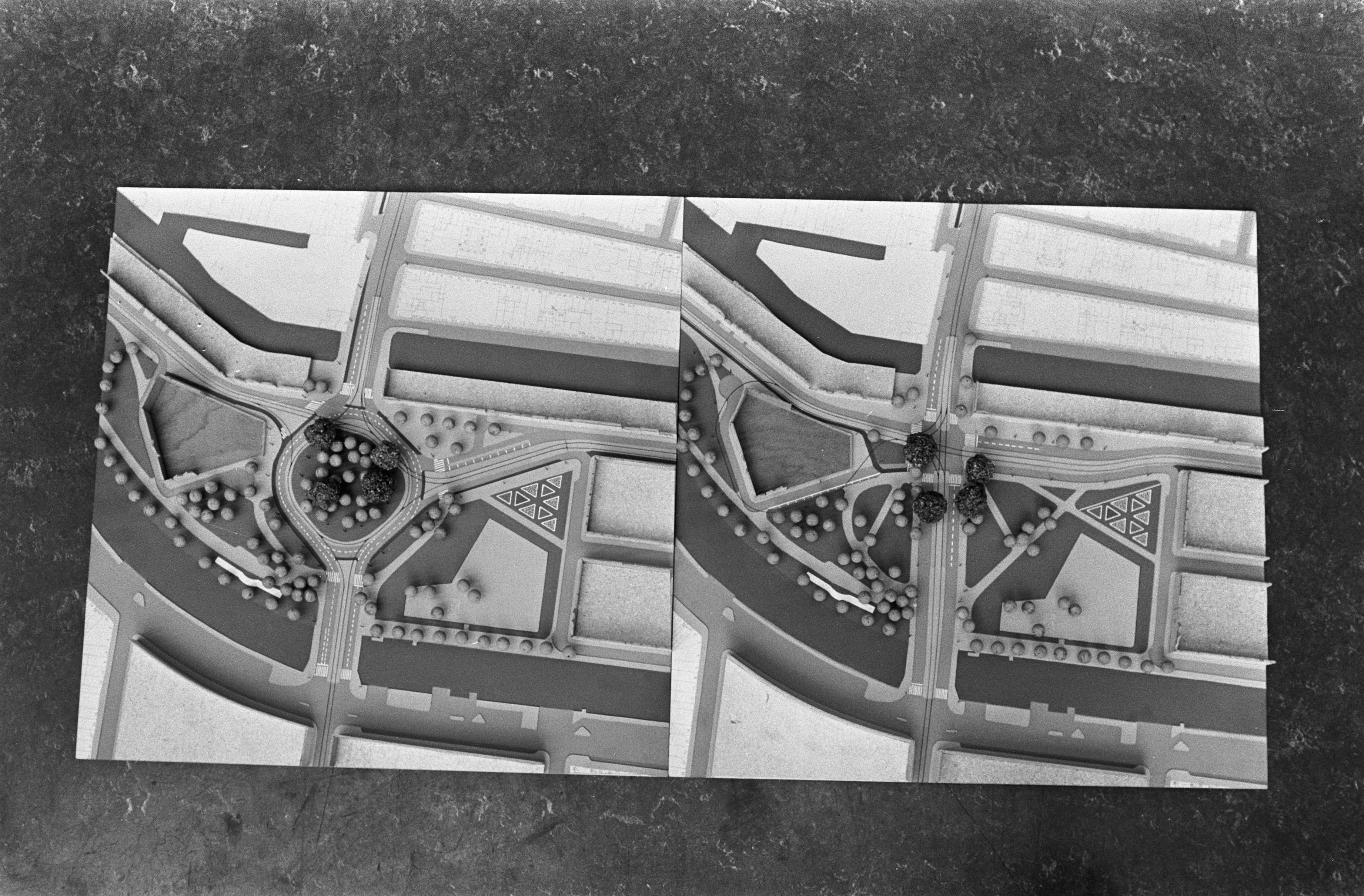 Collectie / Archief : Fotocollectie Anefo Reportage / Serie : Presentatie voor de stadsontwikkeling in de Koopmansbeurs te Amsterdam Beschrijving : Plannen voor het Weteringcircuit Datum : 18 juli 1975 Locatie : Amsterdam, Noord-Holland Trefwoorden : infrastructuur, plattegronden, stadsvernieuwing Instellingsnaam : Koopmansbeurs Fotograaf : Fotograaf Onbekend / Anefo Auteursrechthebbende : Nationaal Archief Materiaalsoort : Negatief (zwart/wit) Nummer archiefinventaris : bekijk toegang 2.24.01.05 Bestanddeelnummer : 928-0565